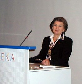 Valentina Tereškova tiedekeskus Heurekassa 14. syyskuuta 2002. / Valentina Tereshkova at science centre Heureka on September the 14th 2002.